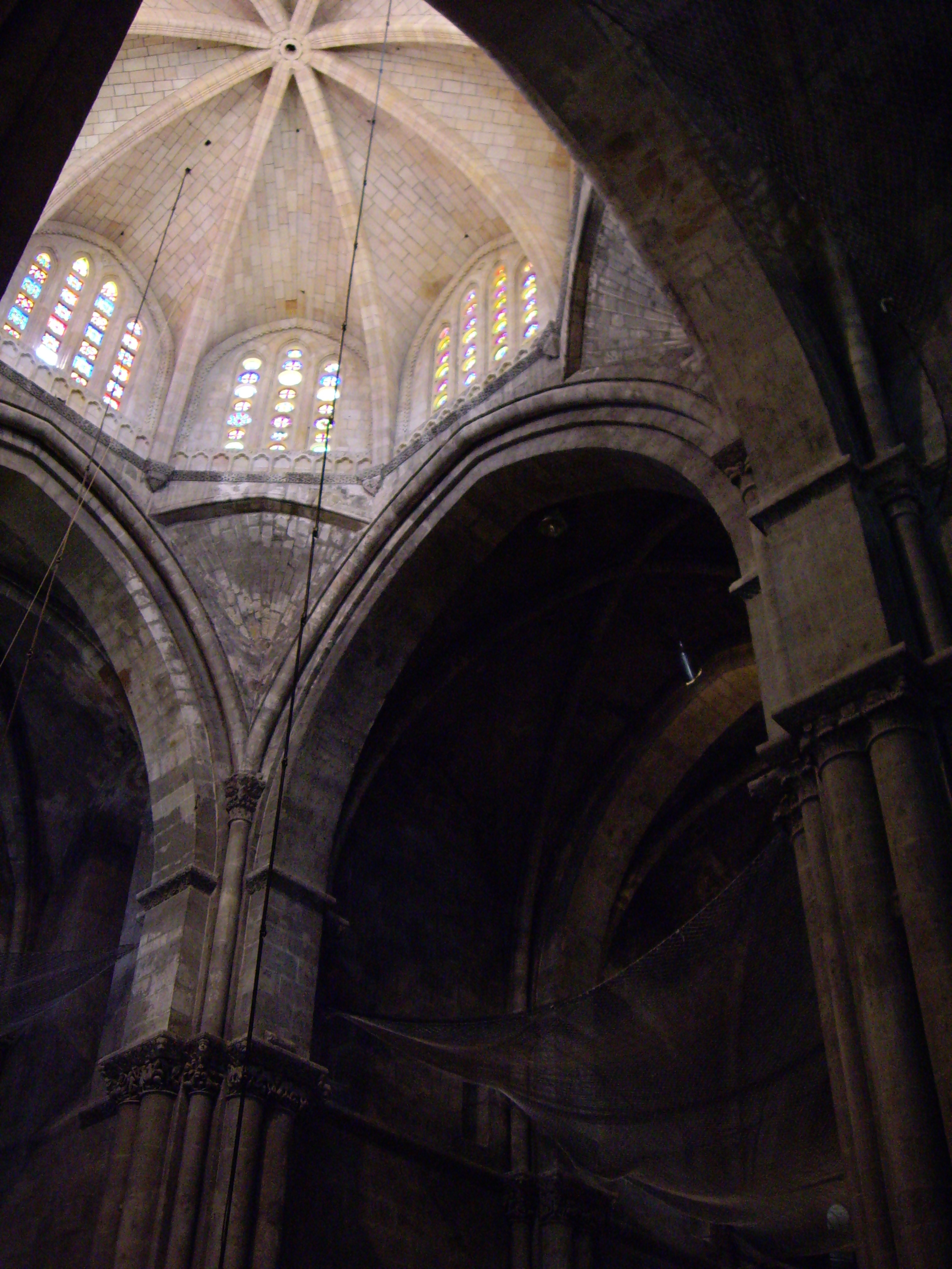 Cimbori de la Catedral de Tarragona.